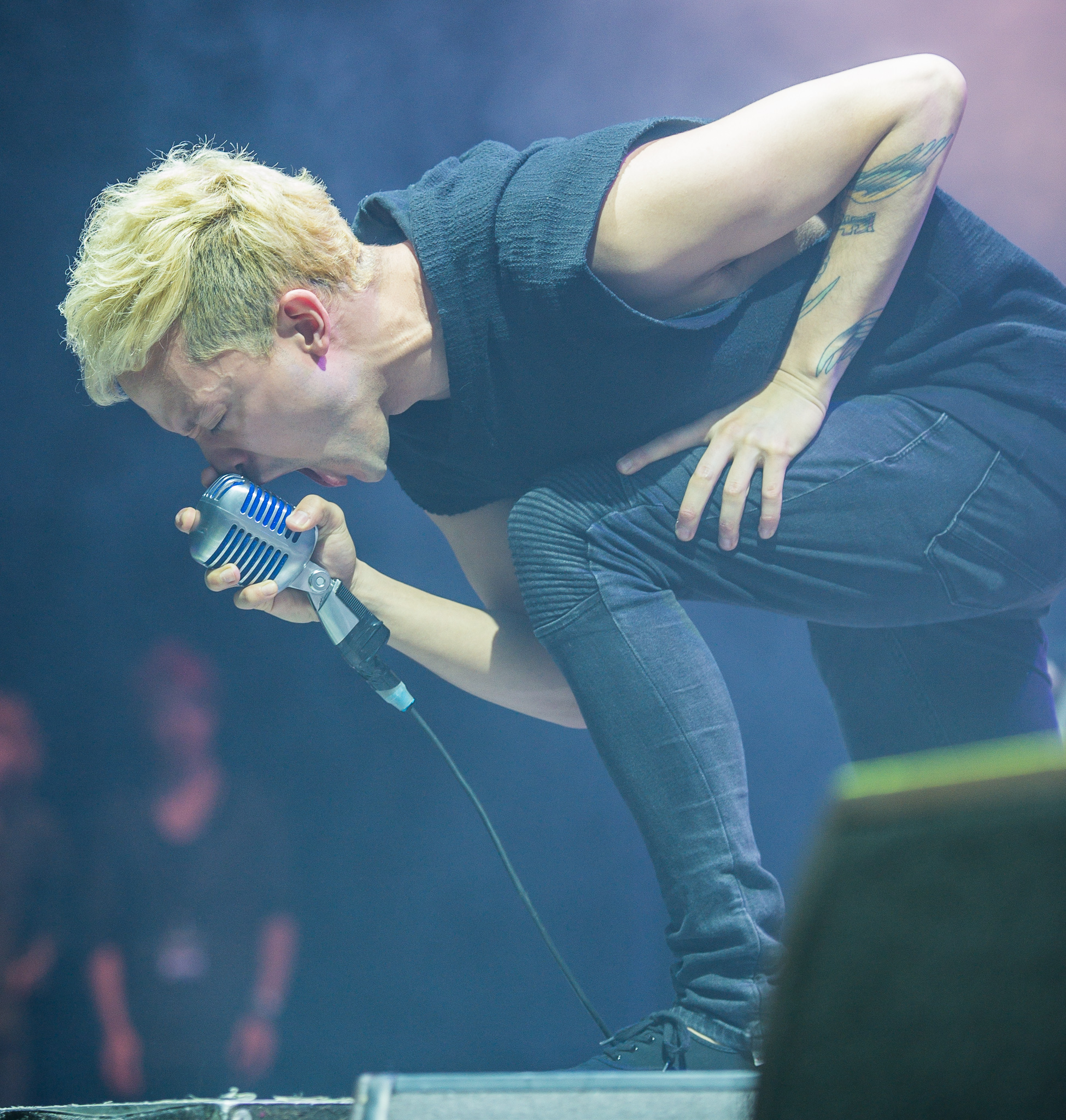 ARGO-Konzerte,Arena Nürnberger Versicherungen,Clubstage,Coldrain,Konzert,Livekonzert,Livemusik,Musik,RiP,Rock im Park 2014